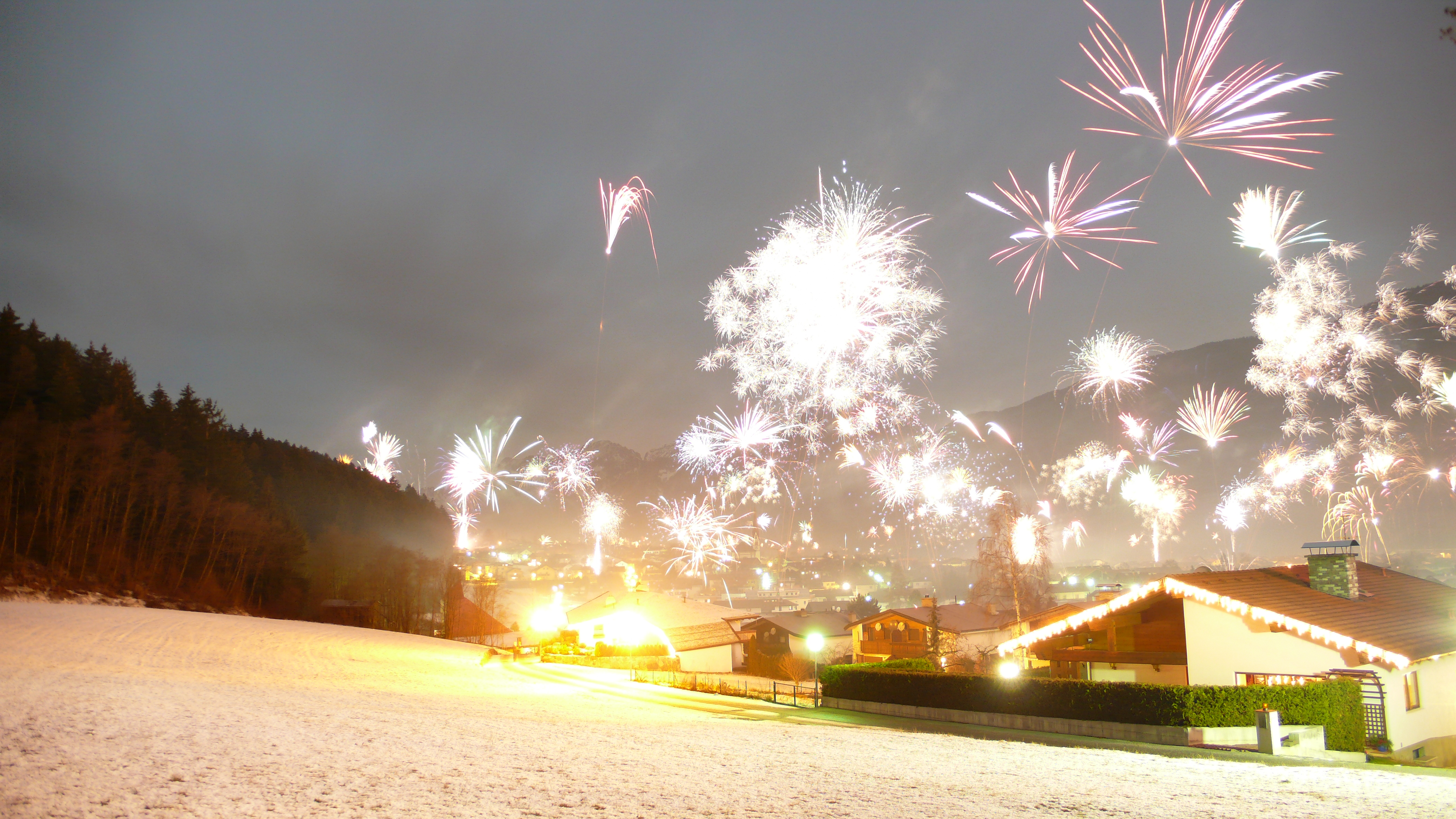 Inzing Silvesterfeuerwerk 2007